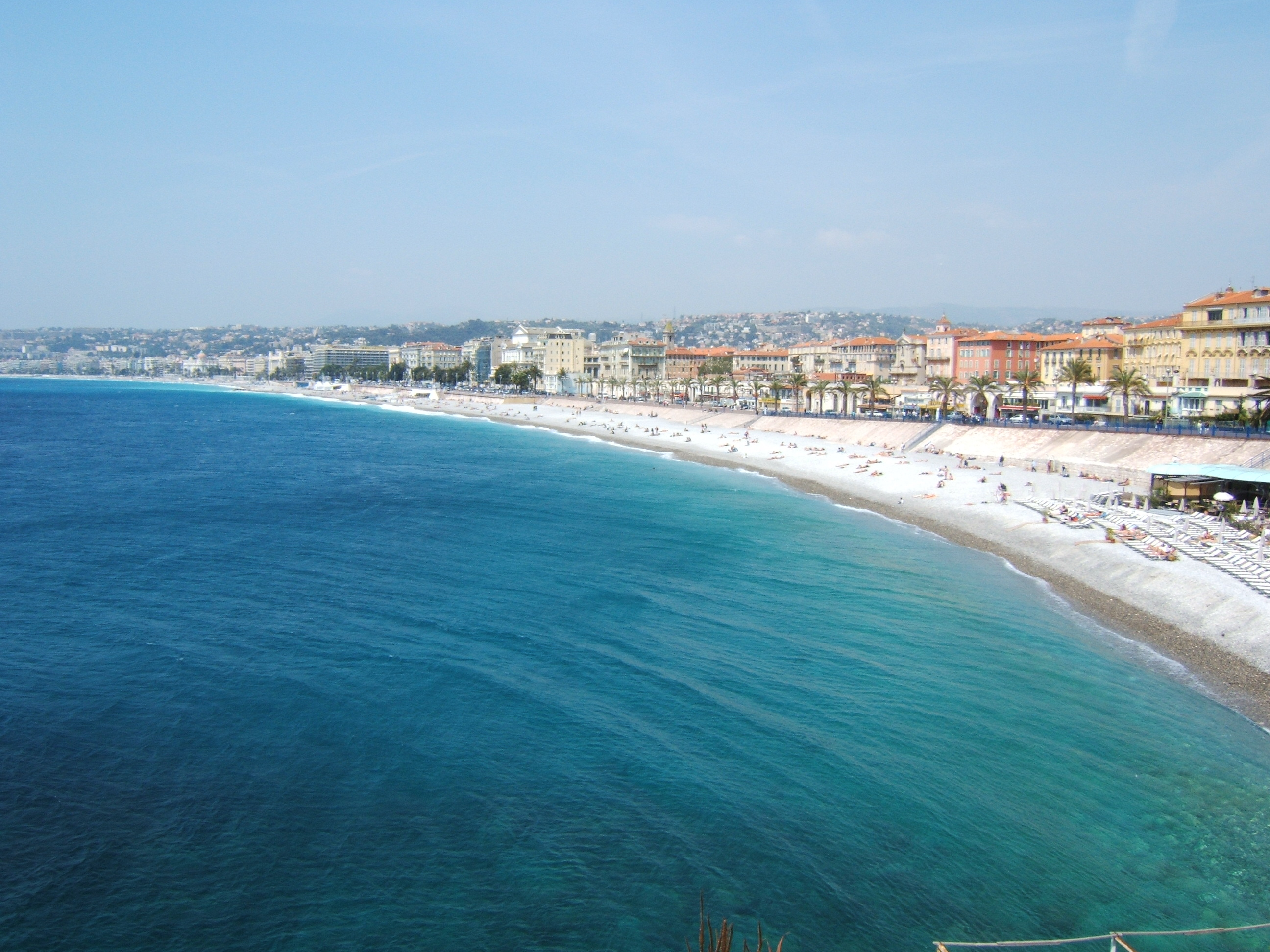 Nice, sa plage et la Baie des Anges vues du quai Rauba Capeu.